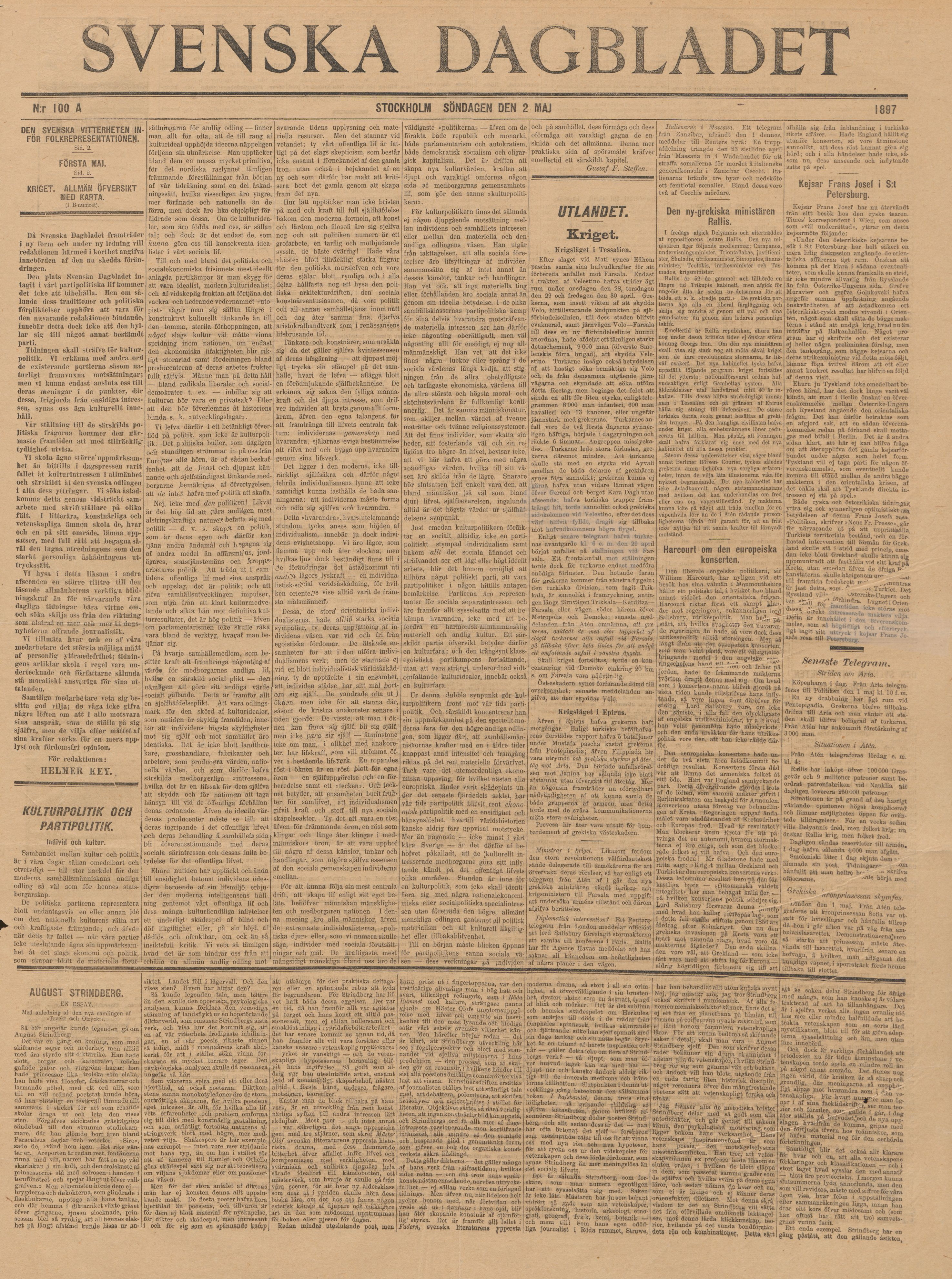 Svenska Dagbladet, söndagen den 2 maj 1897. Första numret under ny ledning, ny form och nytt sidhuvud. Förstasidan innehåller signerade bidrag av Helmer Key (1864-1939), Gustaf F. Steffen (1864-1929) och Oscar Levertin (1862-1906).